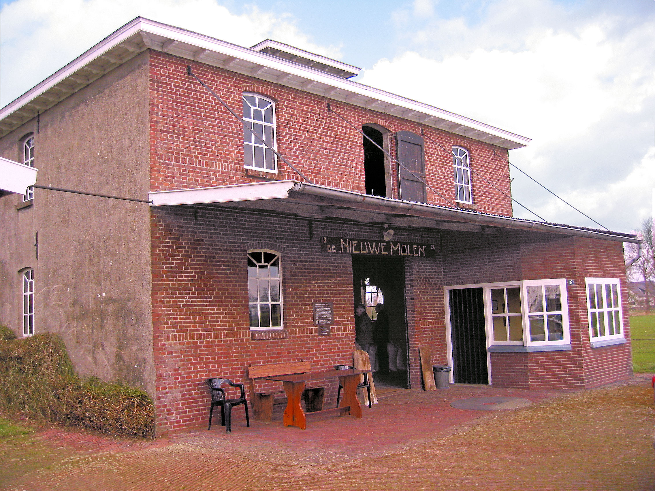 De Nieuwe Molen in Sinderen, the Netherlands